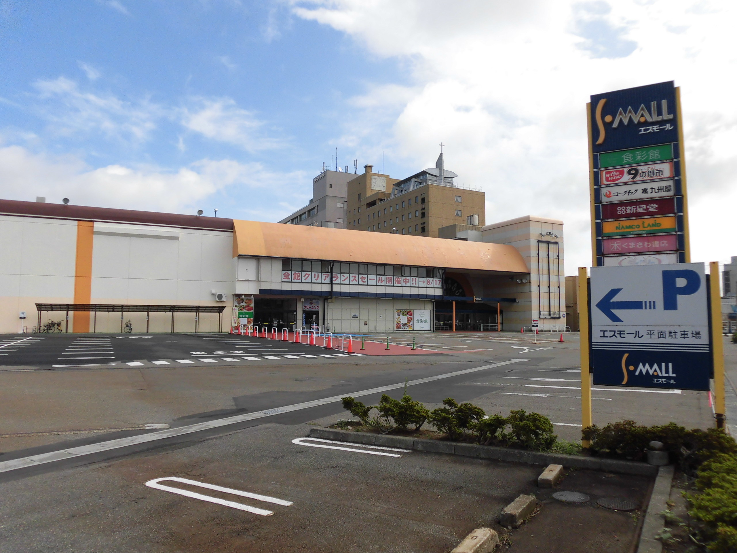 エスモール。山形県鶴岡市錦町に所在。庄交コーポレーションが運営するショッピングセンター。